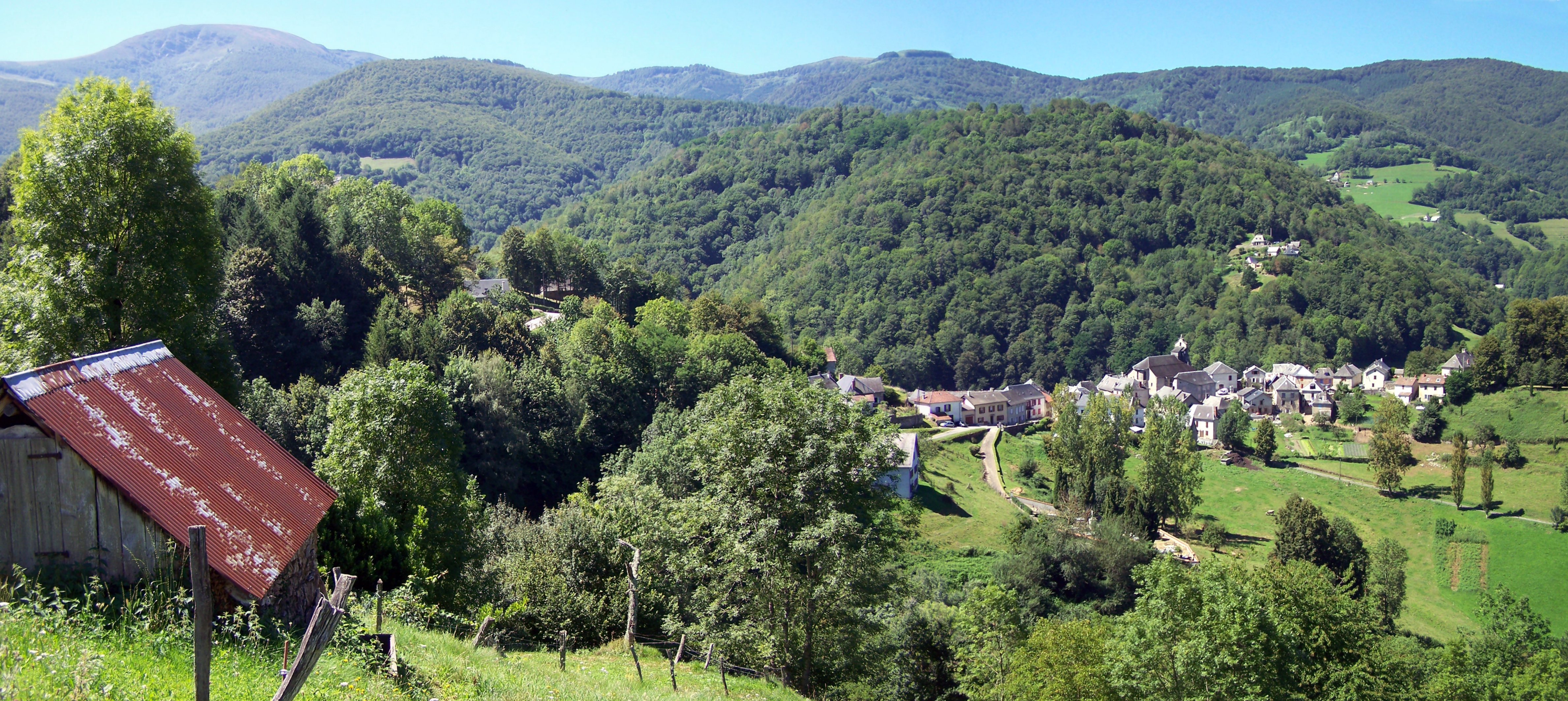 Le village d'Alos (Ariège, France), vue du hameau de La Pauze.